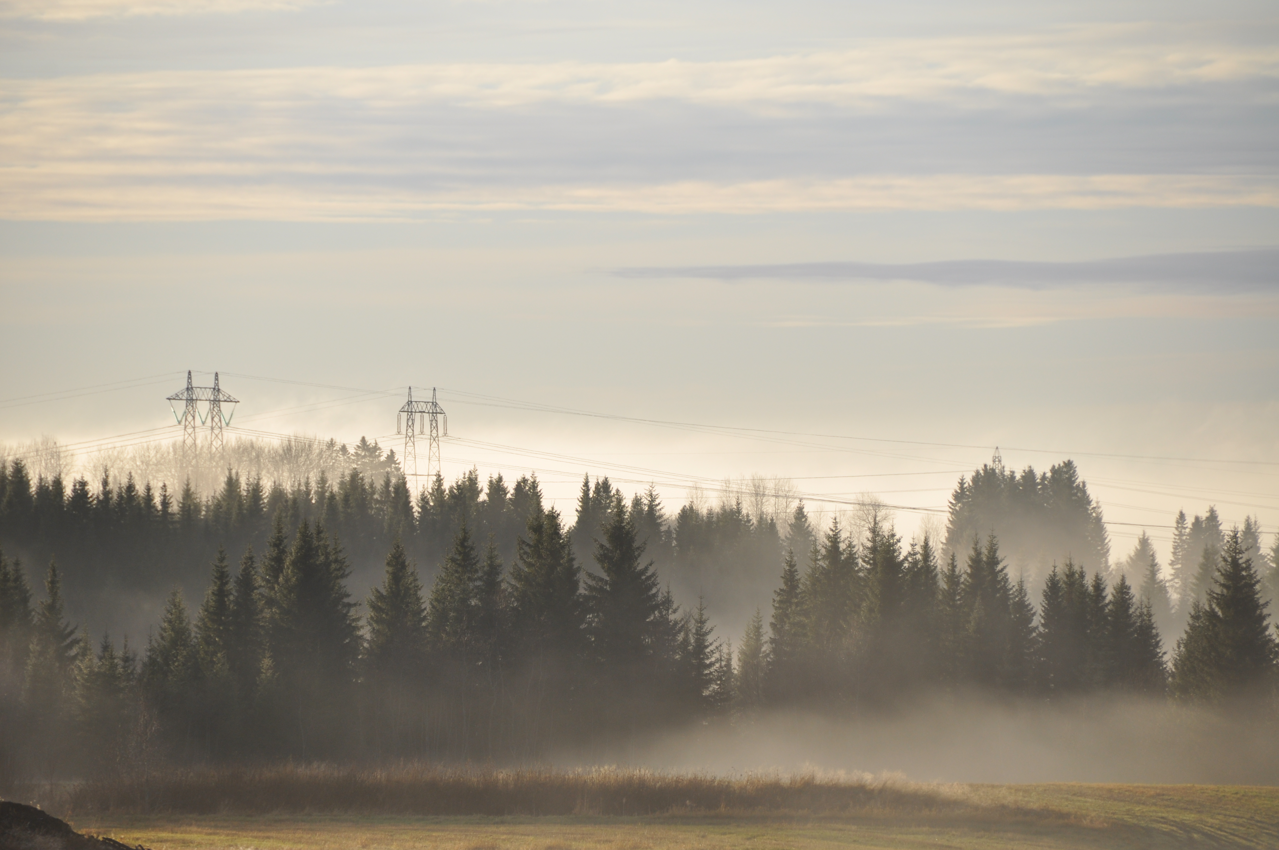 Image Note: The 300 kV power line between Tunnsjødal power plant and Strinda transformation station was built in the early 1960s. This image shows two pylons close to the town of Verdal. Bildenotat: 300 kV kraftledningen mellom Tunnsjødal kraftverk og Strinda transformatorstasjon ble bygget og idriftsatt på første halvdel av 1960-tallet. Dette bildet viser to masterekker gjennom skogen sør for Verdal. Date/Dato: 30.10.2009 Photographer/Fotograf: Sissel Riibe Feel free to use the photos, but please make sure you attribute the photographer and mention NVE as the source. Bruk gjerne bildene, men vennligst oppgi fotografens navn og angi NVE som kilde. Format: Digital Archive/Arkiv: Image ID/Bilde ID